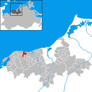 Wittenbeck in Mecklenburg-Western Pomerania - District Bad Doberan